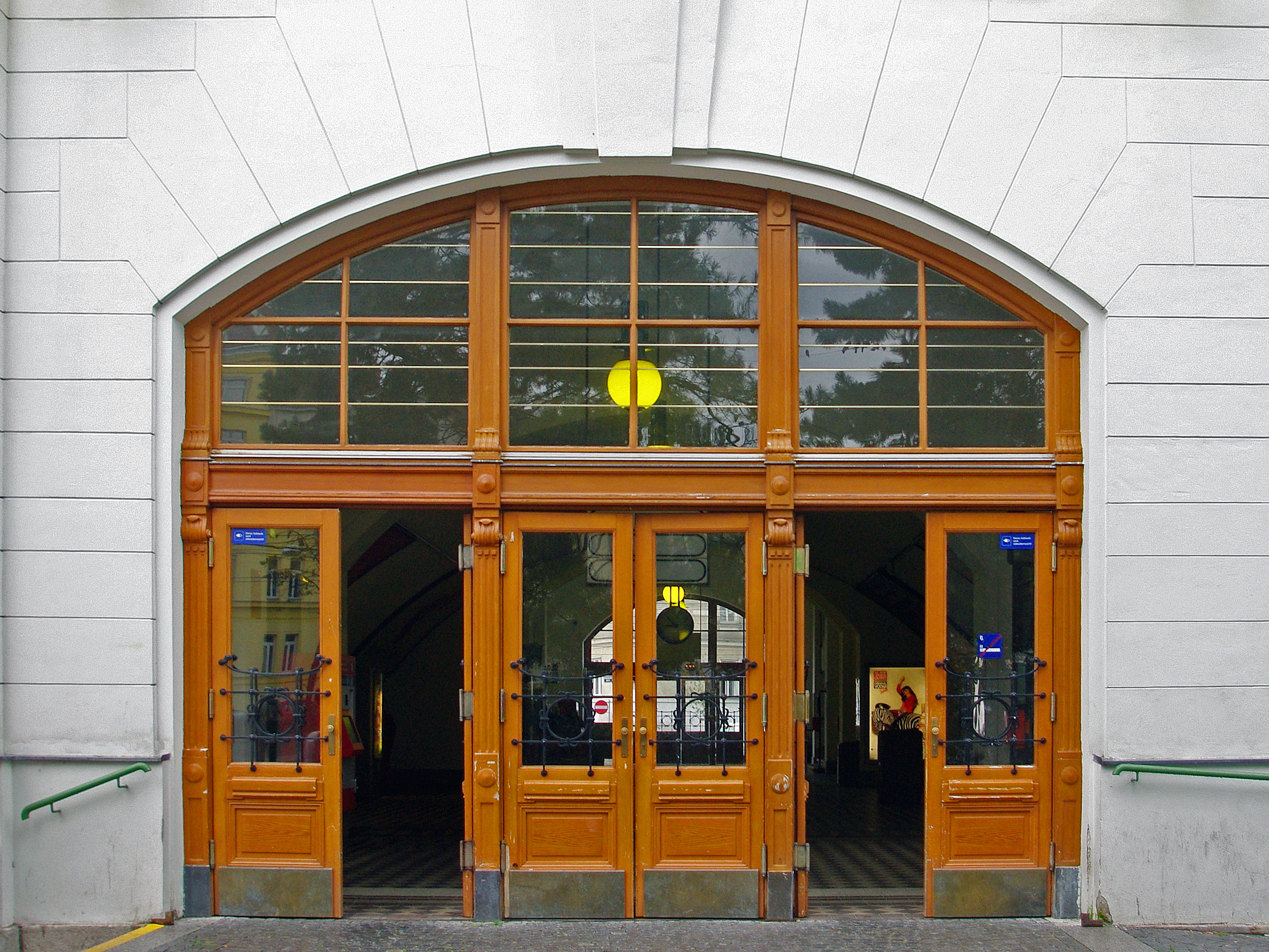 Wiener Vorortelinie - Station Hernals und Gleisabschnitt